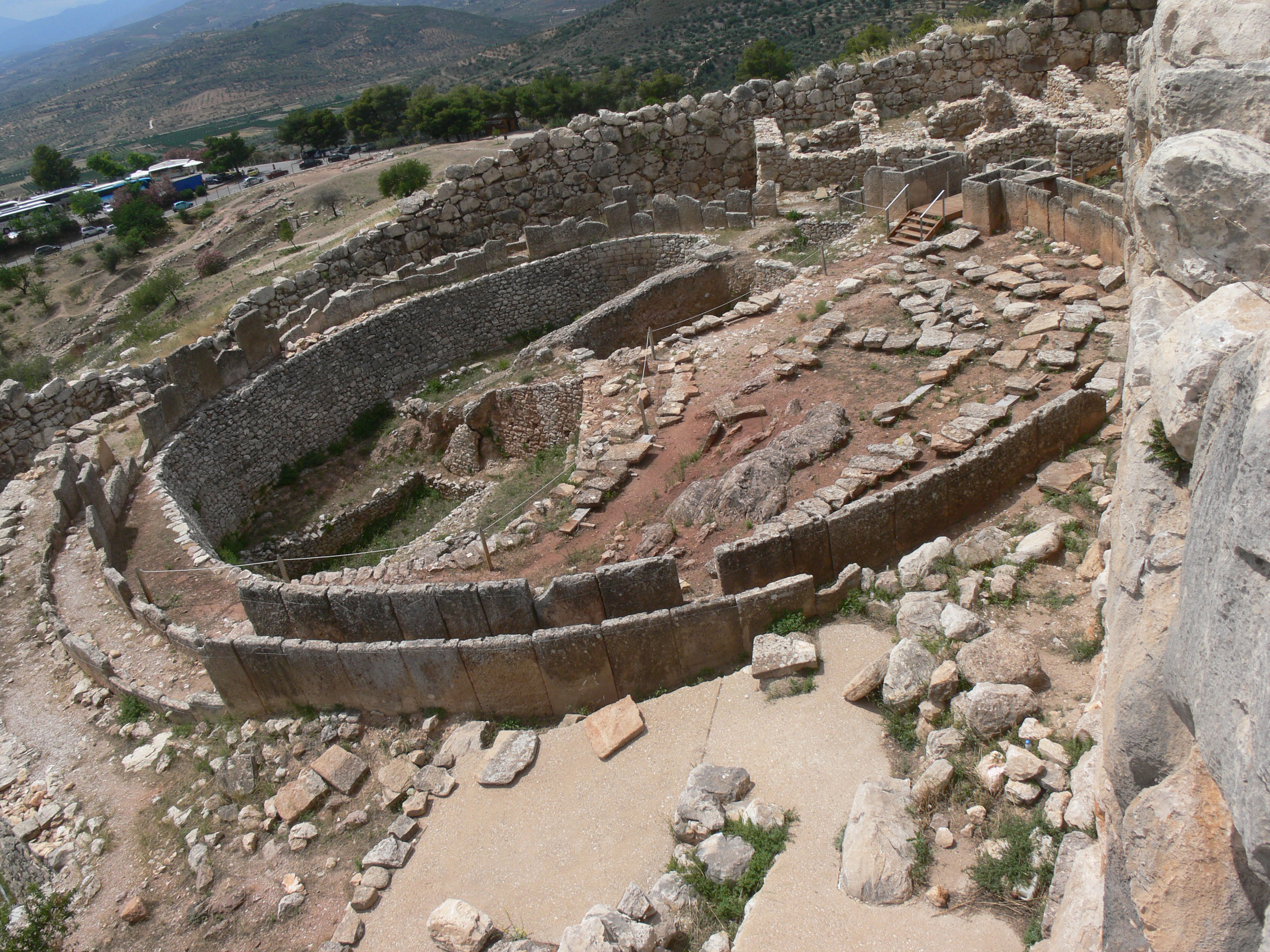 Mykene Palast. Rundgrab.